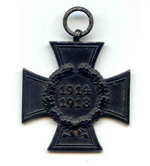 Militärische Auszeichnung Deutschland 1934 Ehrenkreuz des Weltkrieges 1914/1918, in drei Klassen, hier: 3. Ehrenkreuz für Hinterbliebene.